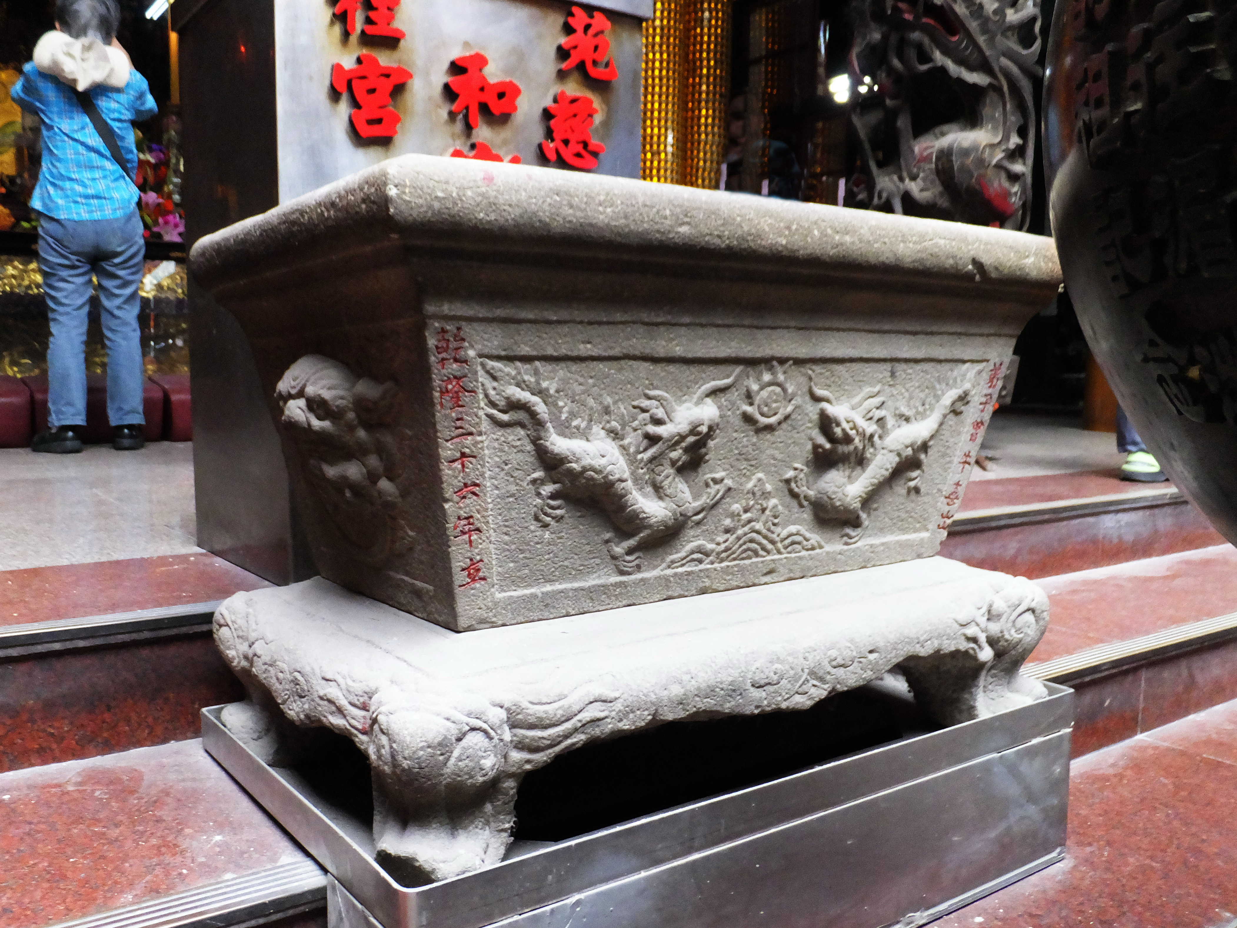 苗栗縣苑裡慈和宮香爐 Insense Burner